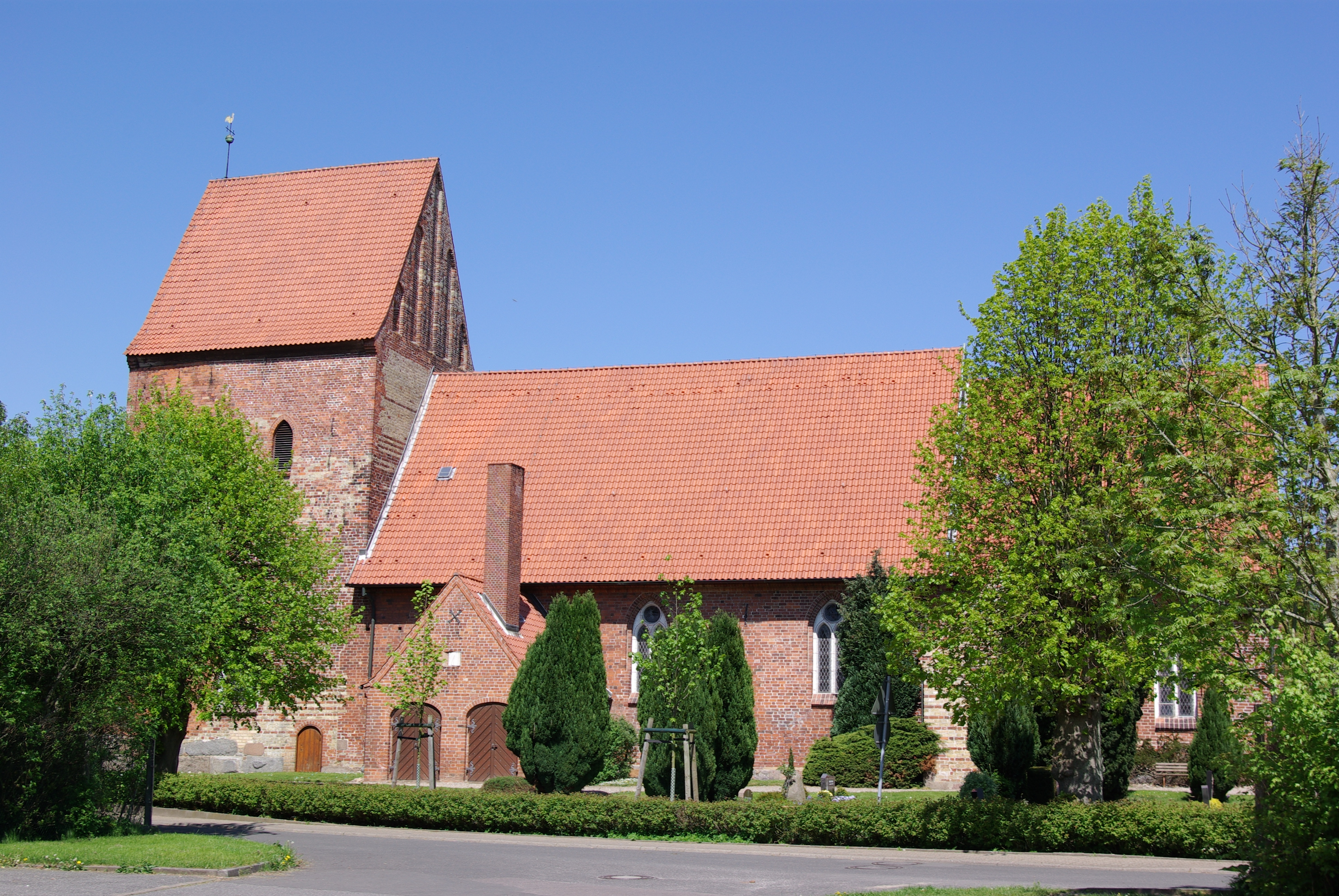 Karby in Schleswig-Holstein. Die Kirche in der Dorfmitte steht unter Denkmalschutz.